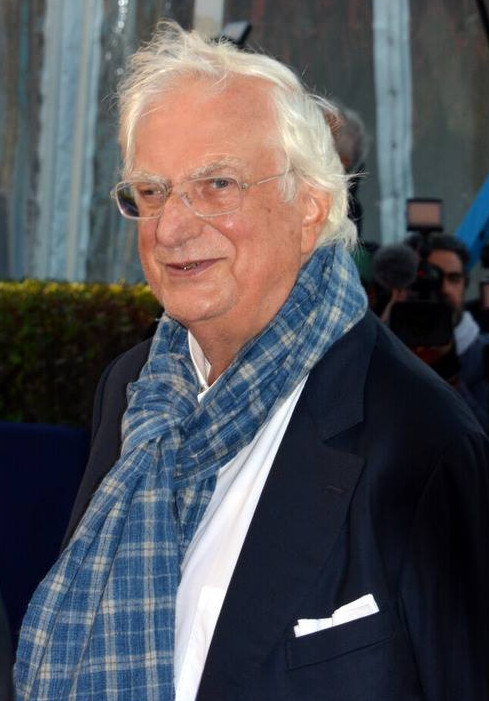 Bertrand Tavernier au festival du cinéma américain de Deauville